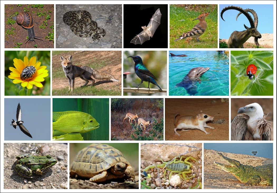 החי של ארץ ישראל